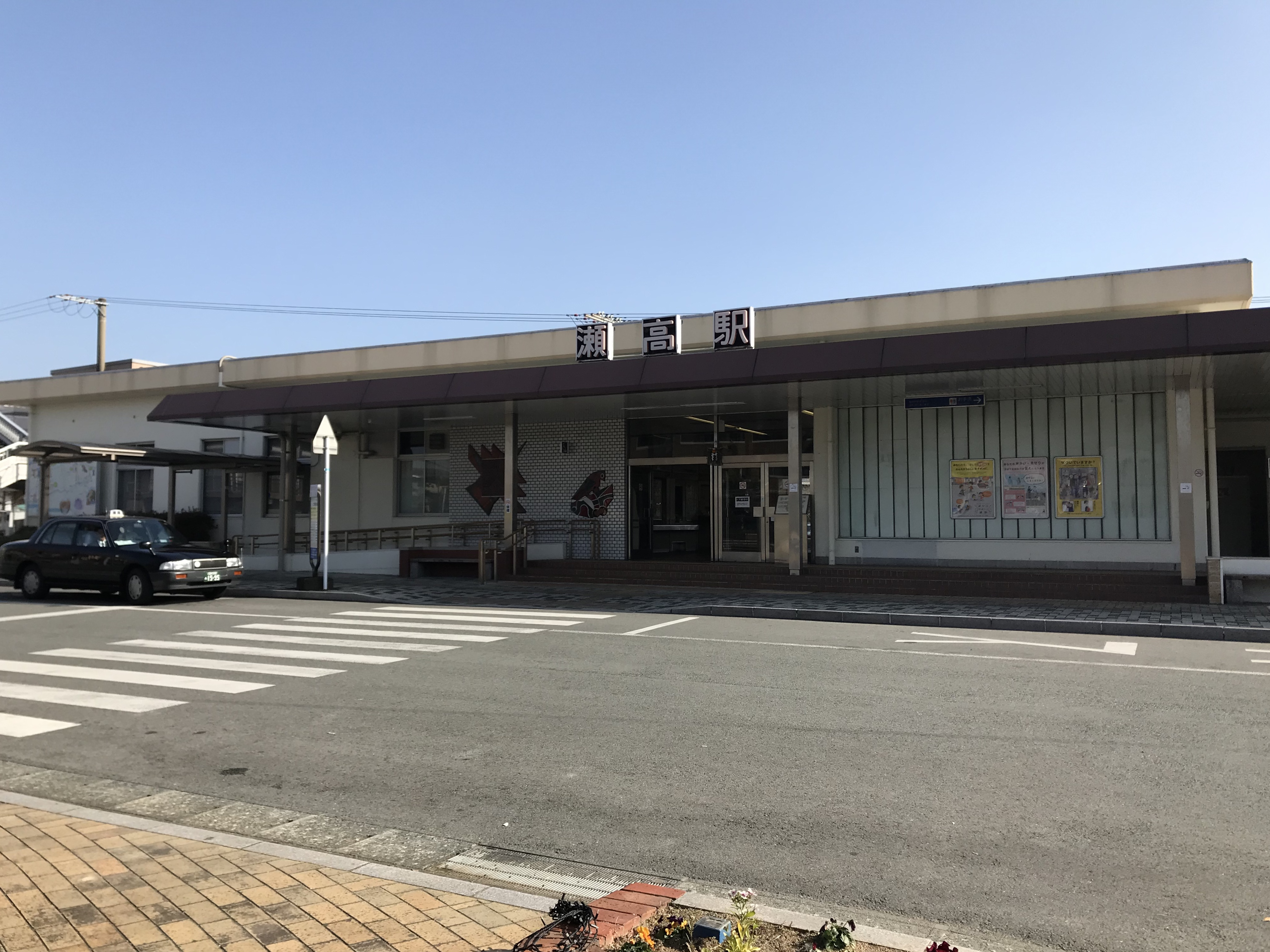 瀬高駅の駅舎